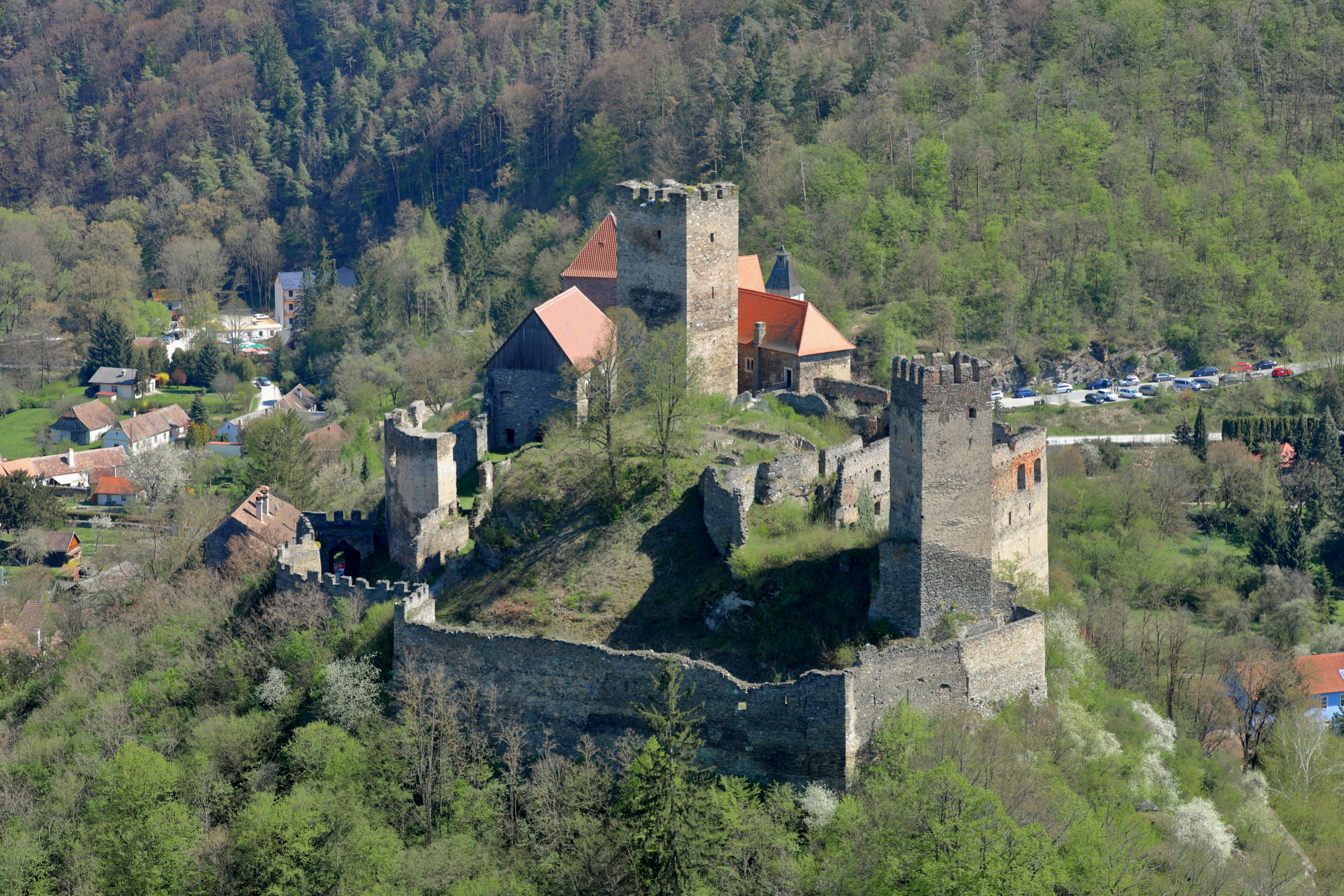 Nordwestansicht der Burg in der niederösterreichischen Stadt Hardegg.Eine ausgedehnte vielteilige mittelalterliche Anlage mit hochaufragendem Burgfried. Die Burg wurde vermutlich um die 11./12. Jahrhundertwende errichtet und nach einem Brand im Jahr 1506 erfolgte ein Umbau. Nach einem Erdbeben 1754 Verfall zu einer Ruine. Ab 1878 bis Anfang des 20. Jahrhundert wurde die Burg instandgesetzt und teilweise wieder aufgebaut.